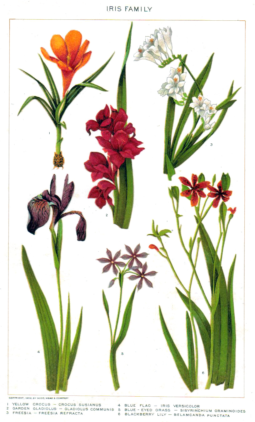 Painting